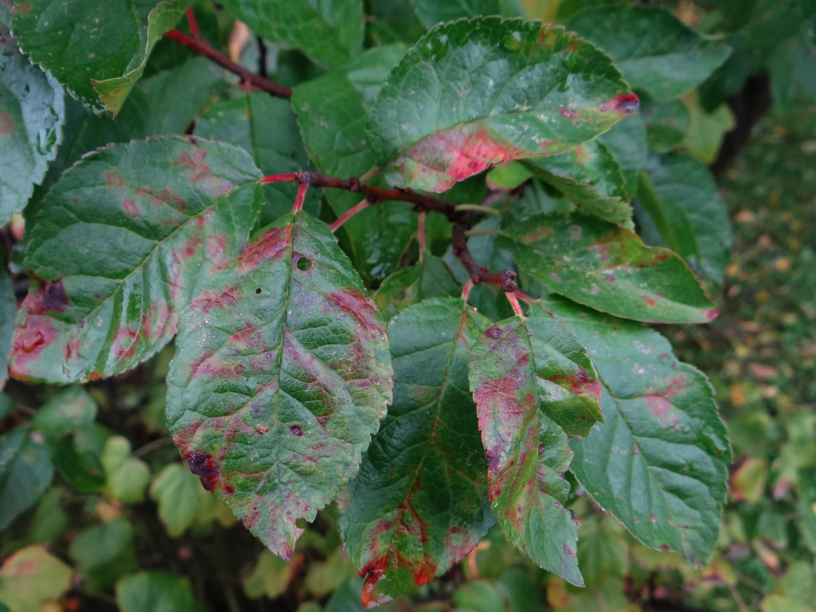 Polystigma rubrum on leaf Prunus domestica (renkloda 'Ulena'). Location: Poland, Trzciana (województwo małopolskie)